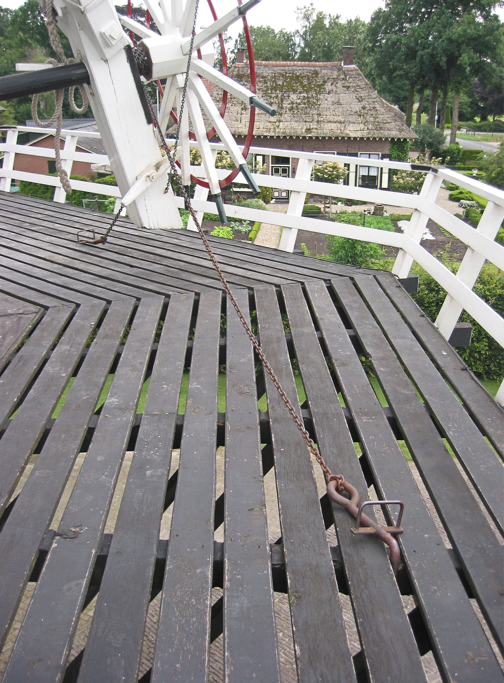 Kruiketting Walderveensemolen in Walderveen, Gelderland, the Netherlands